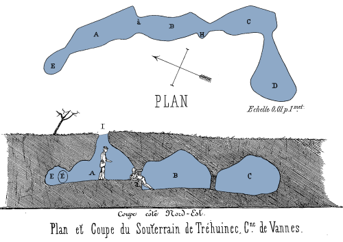 Bulletin de la Société polymathique du Morbihan. 1861. Coupe du souterrain de tréhuinec